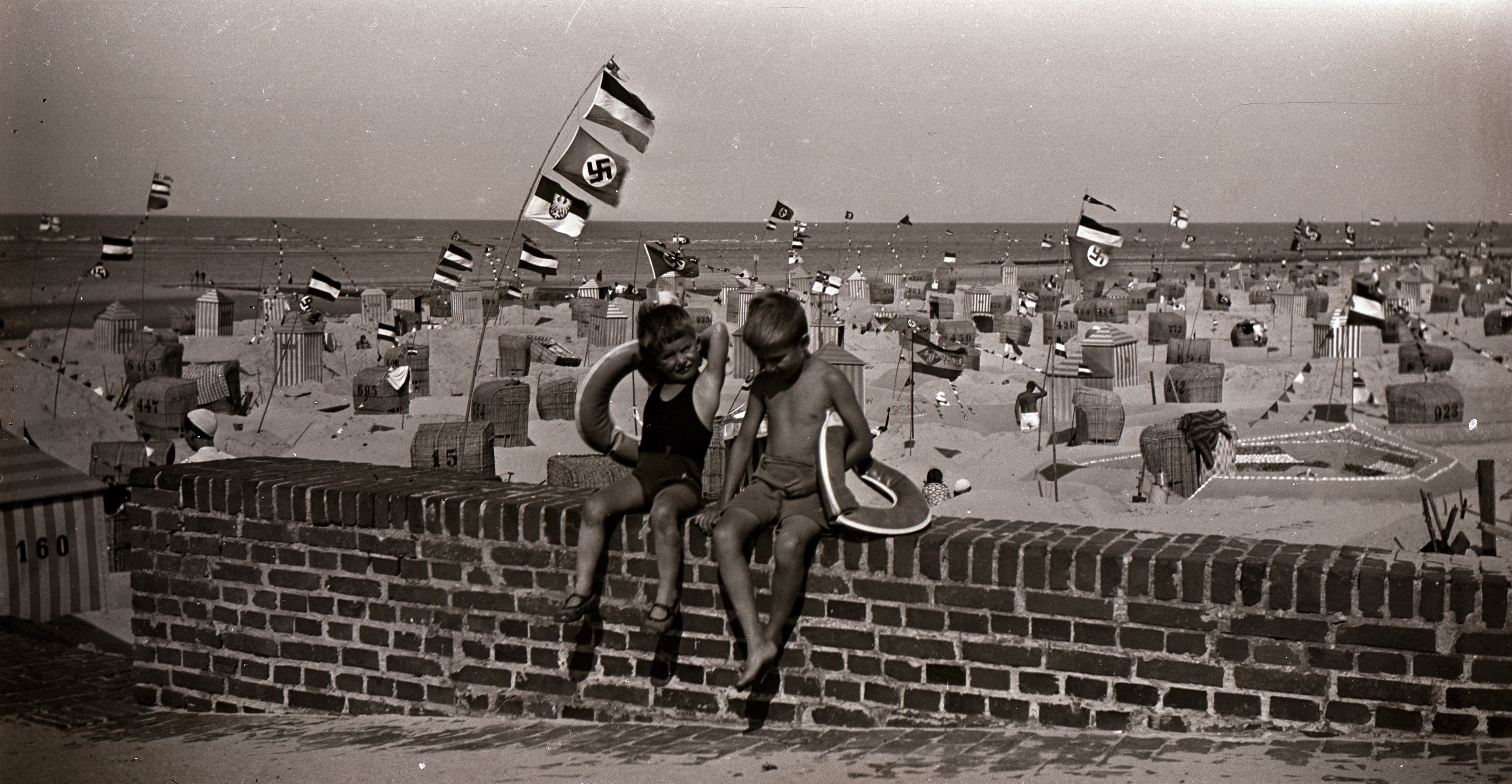 Wangerooge, Sommer 1935, Hakenkreuz-Fahnen am Strand. Das Bild ist am Hauptstrand, unterhalb der oestlichen "Oberen Strandpromenade" von Wangerooge entstanden. Originalformat (Nitrat-)Negativ ohne Herstellerkennzeichnung: ca. 64x108mm. Dargestellt ist (li) der fünfjährige Helmut Kramer aus Helmstedt